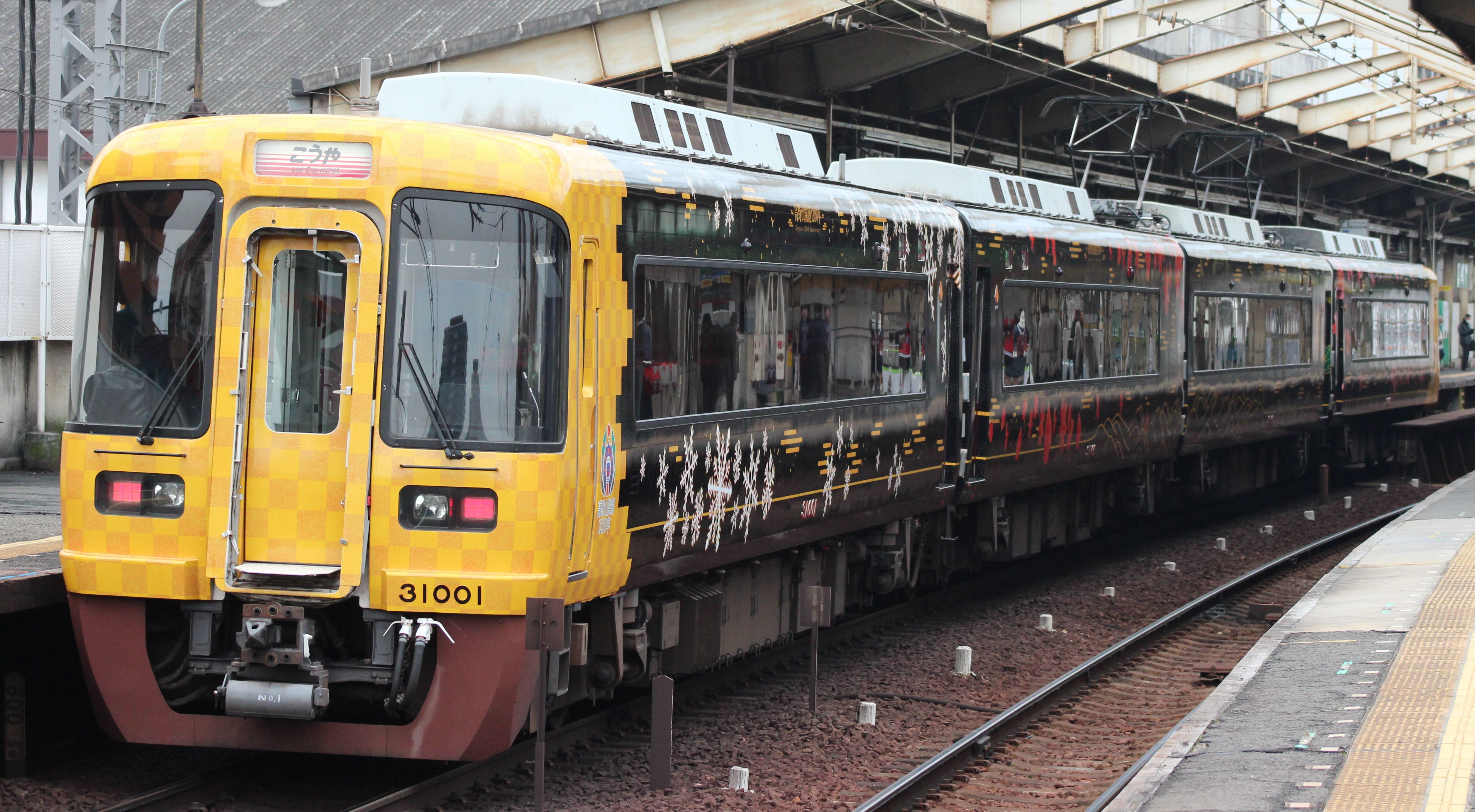 南海31000系電車 「黒こうや」 新今宮駅で撮影